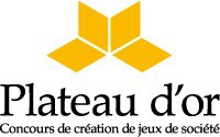 Plateau d'or